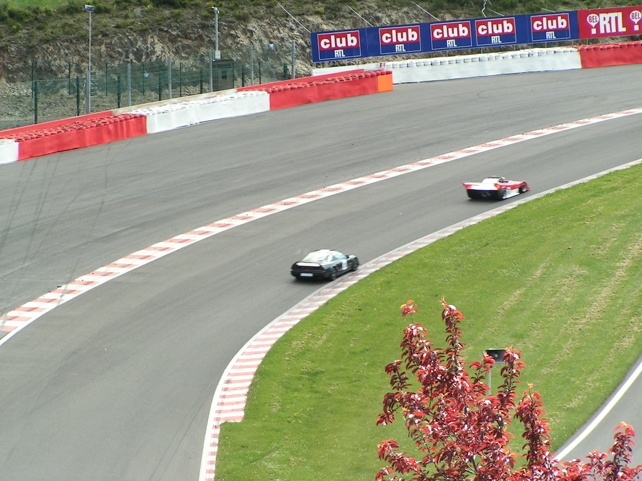 Die Kurve "Eau Rouge" der Rennstrecke Spa-Francorchamps mit neuer Asphalt-Auslaufzone